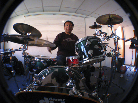 Alex es extensamente reconocido y respetado como un gran maestro, “clinician”, seminarista, y demostrador de nuevas técnicas de batería y percusión, por lo cual ya tiene grabado 4 videos educacionales que son distribuidos internacionalmente